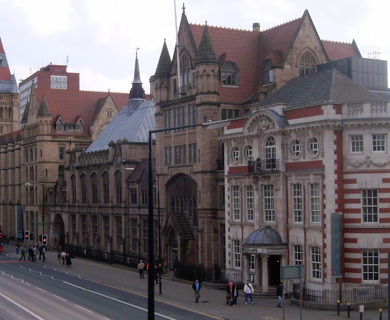 The Manchester Museum